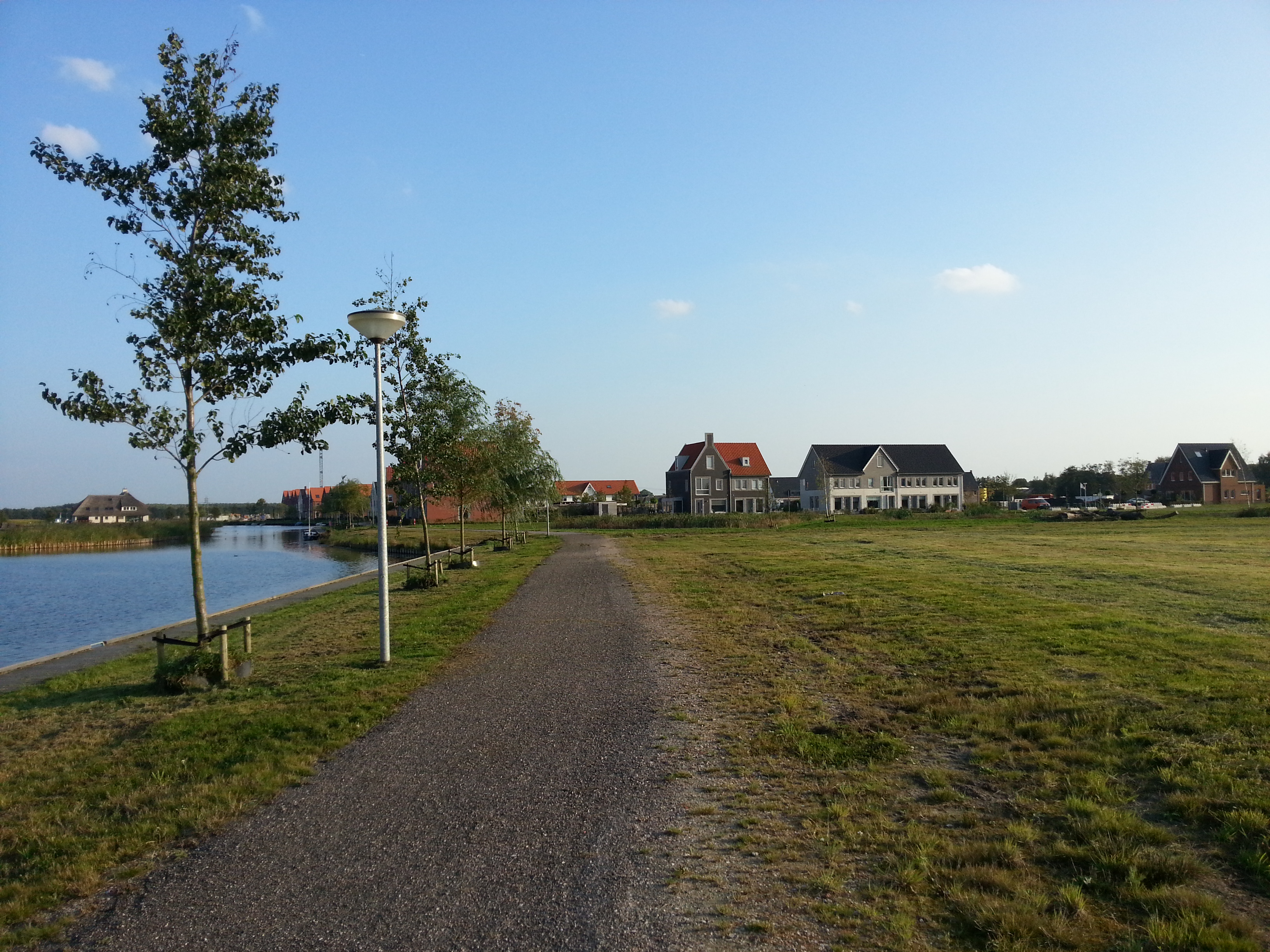 Een grindpad vanaf de Driemerenweg naar de buurt Meeroevers in Meerstad. Aan de linkerkant is een van de meren te zien.